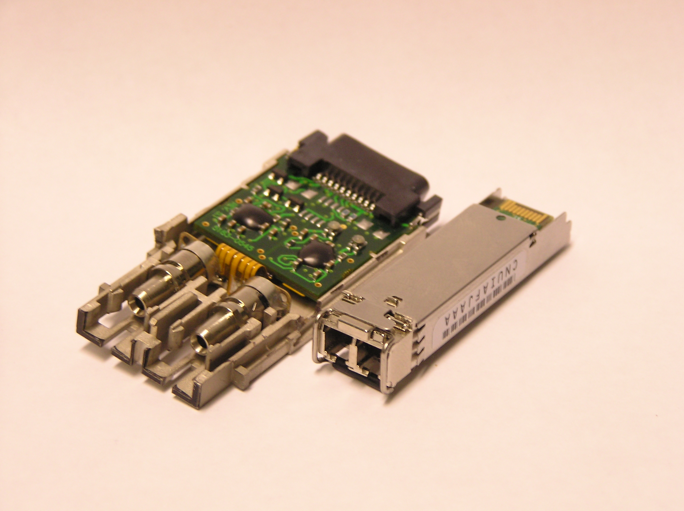 Gigabit Interface Converter (GBIC) alt & neu (SFP)